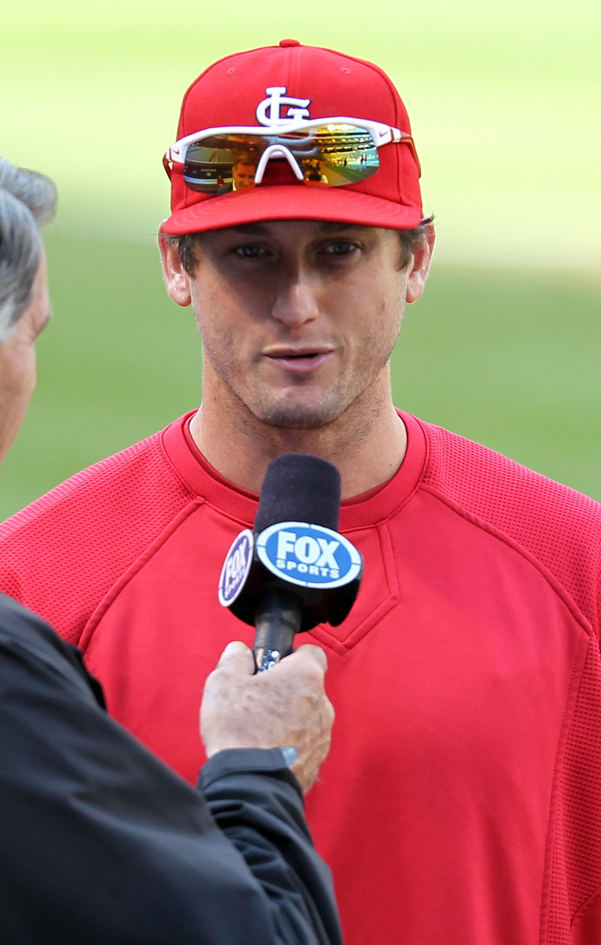 David Freese